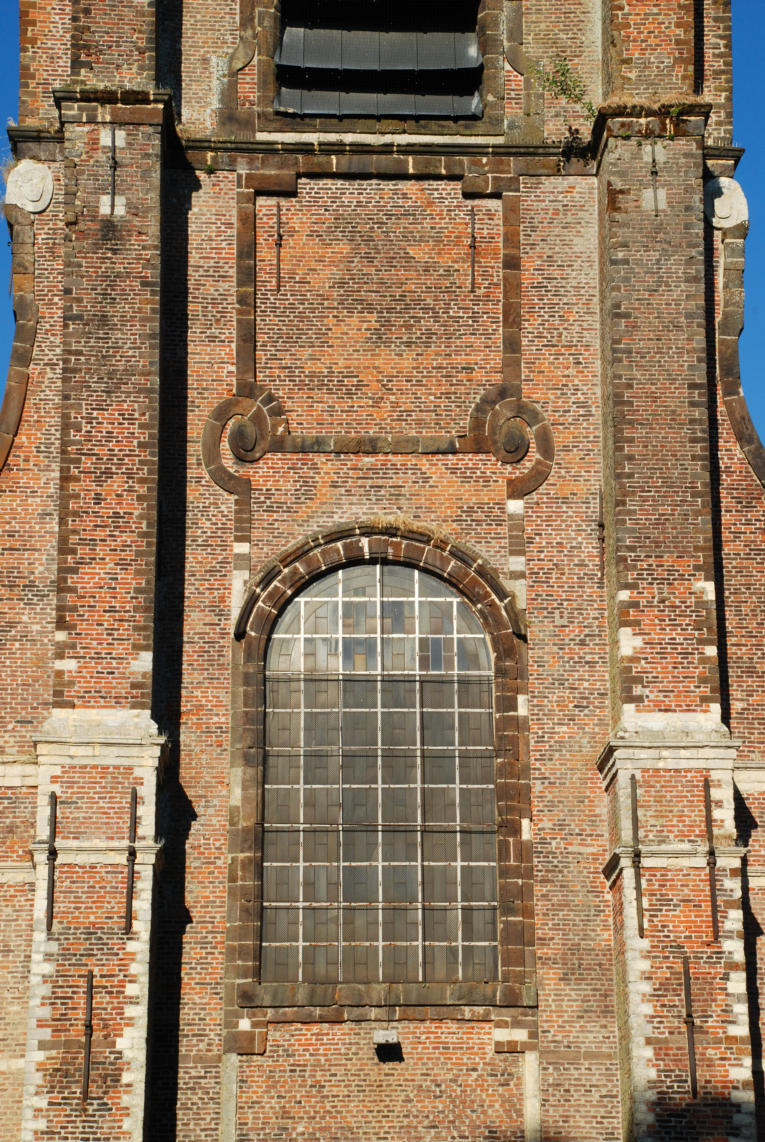 Belgique - Wallonie - Wavre - Église Saint-Martin de Limal